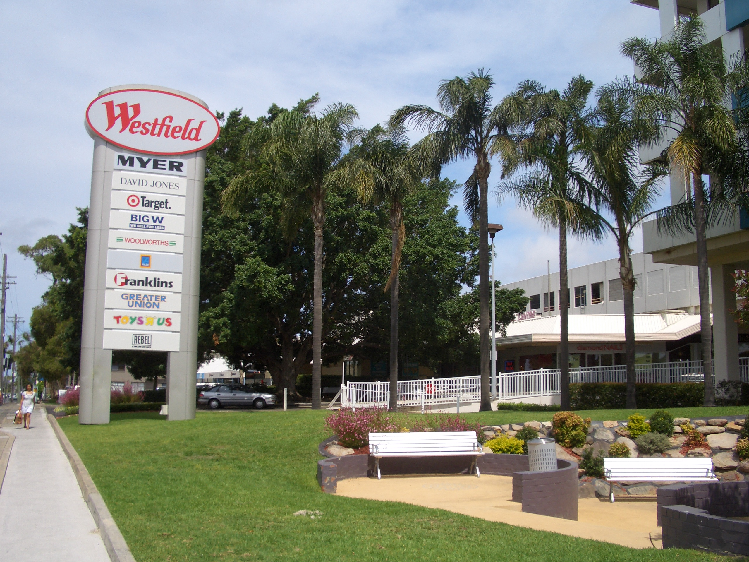 Miranda